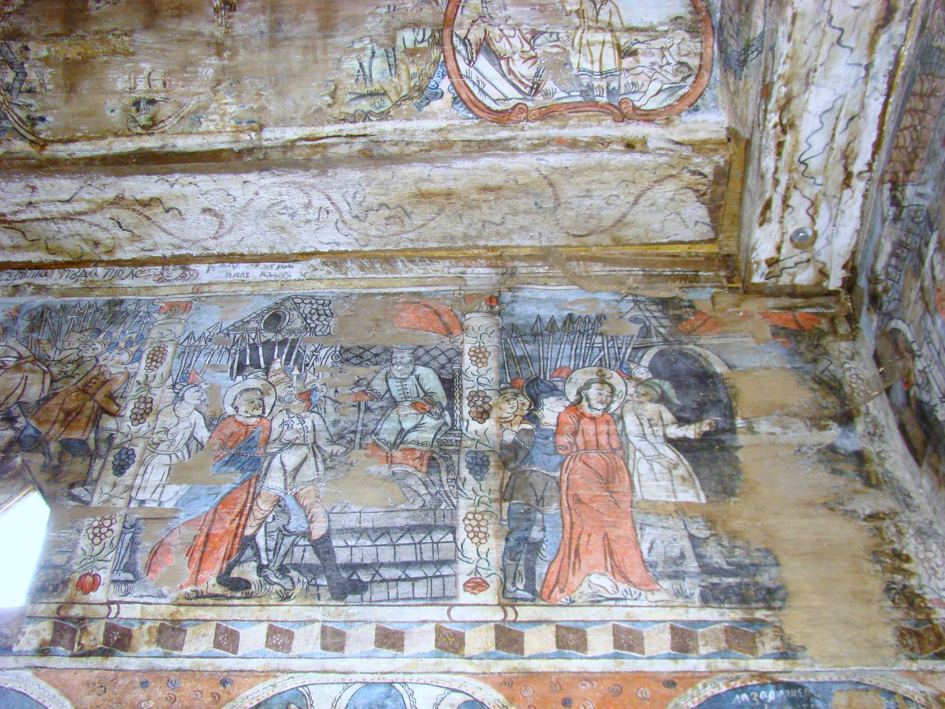 Biserica de lemn "Intrarea Maicii Domnului în Biserică" , sat BÂRSANA